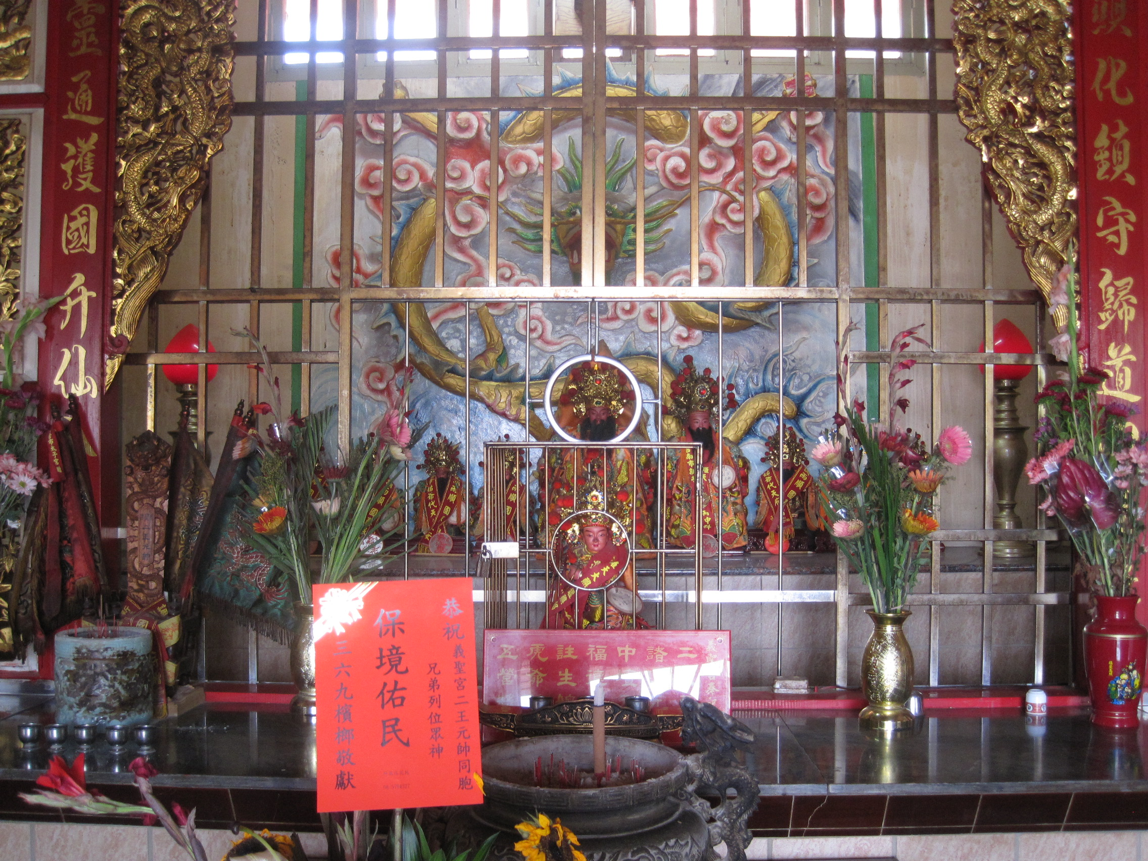 隆田義聖宮神龕